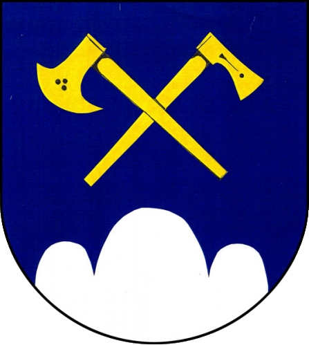 znak obce Valašská Bystřice